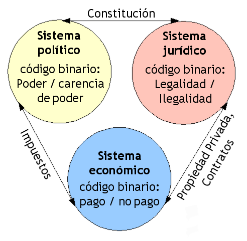 Strukturelle Kopplung - spanische Version